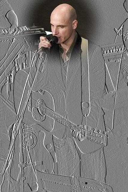 Concierto celebrado en el Teatro Lara de Madrid